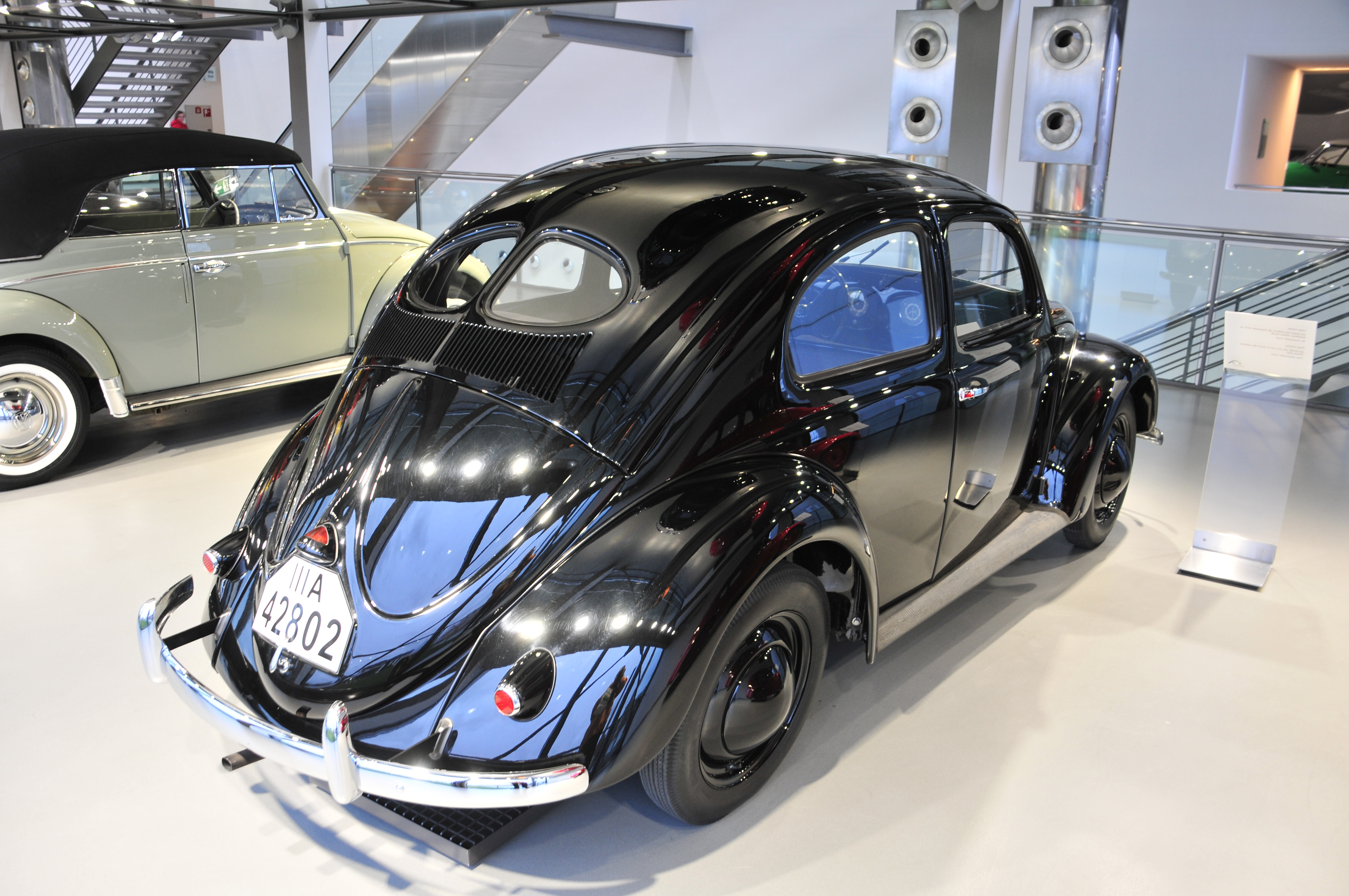 Fahrzeug in der Autostadt Wolfsburg